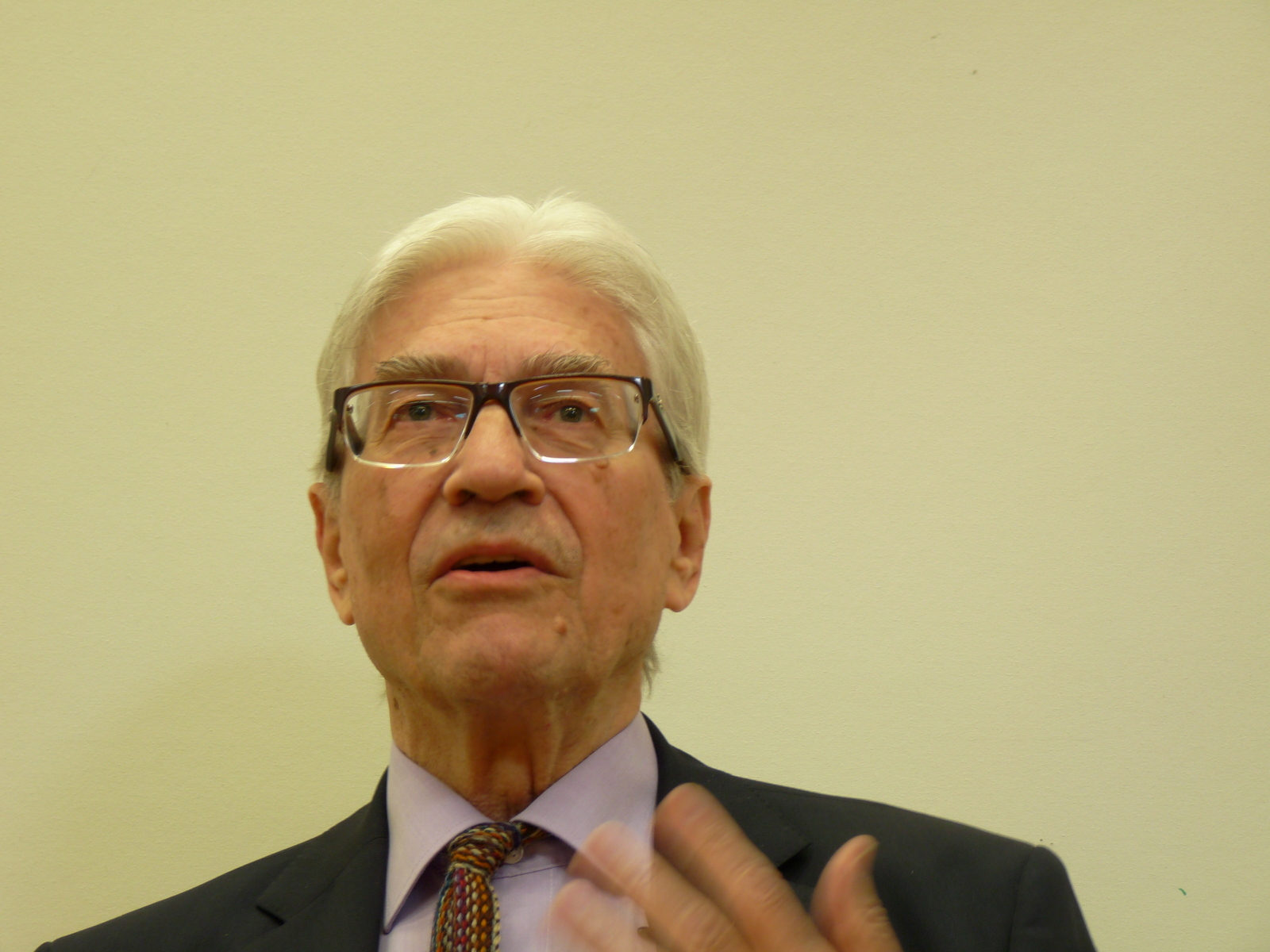 Professor Bugarski at his Ljubljana lecture on language identity